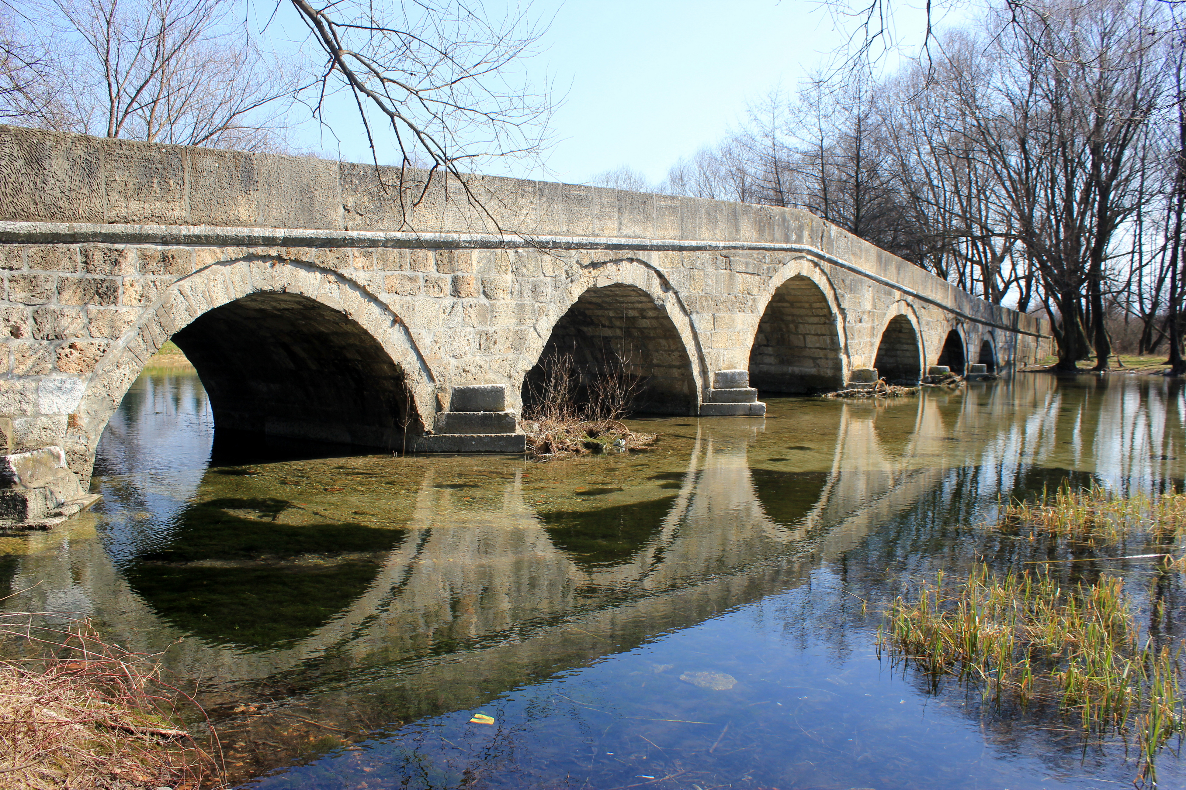 Die Steinbogenbrücke Rimski most über die Bosna bei Ilidža.